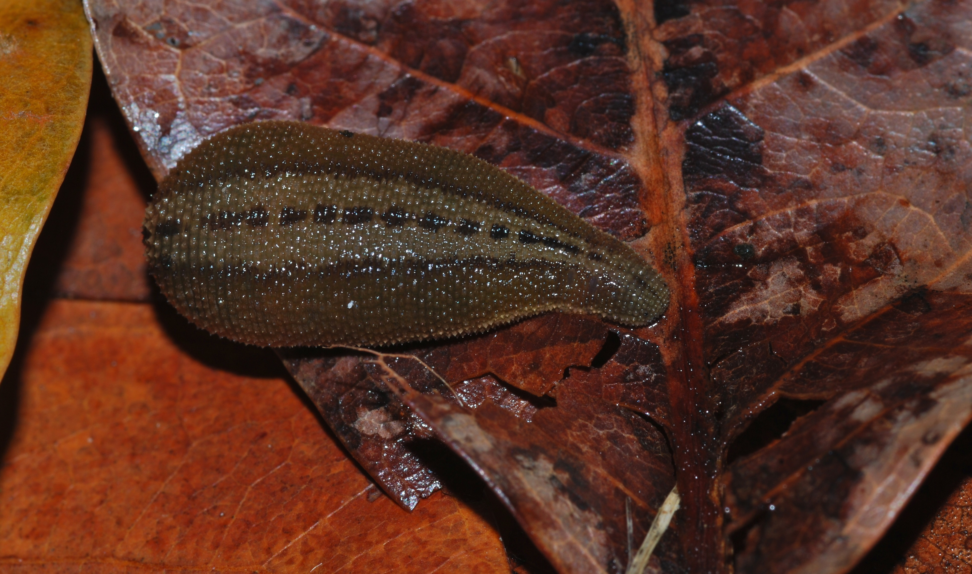 Taman Negara NP, Pahang, MALAYSIA